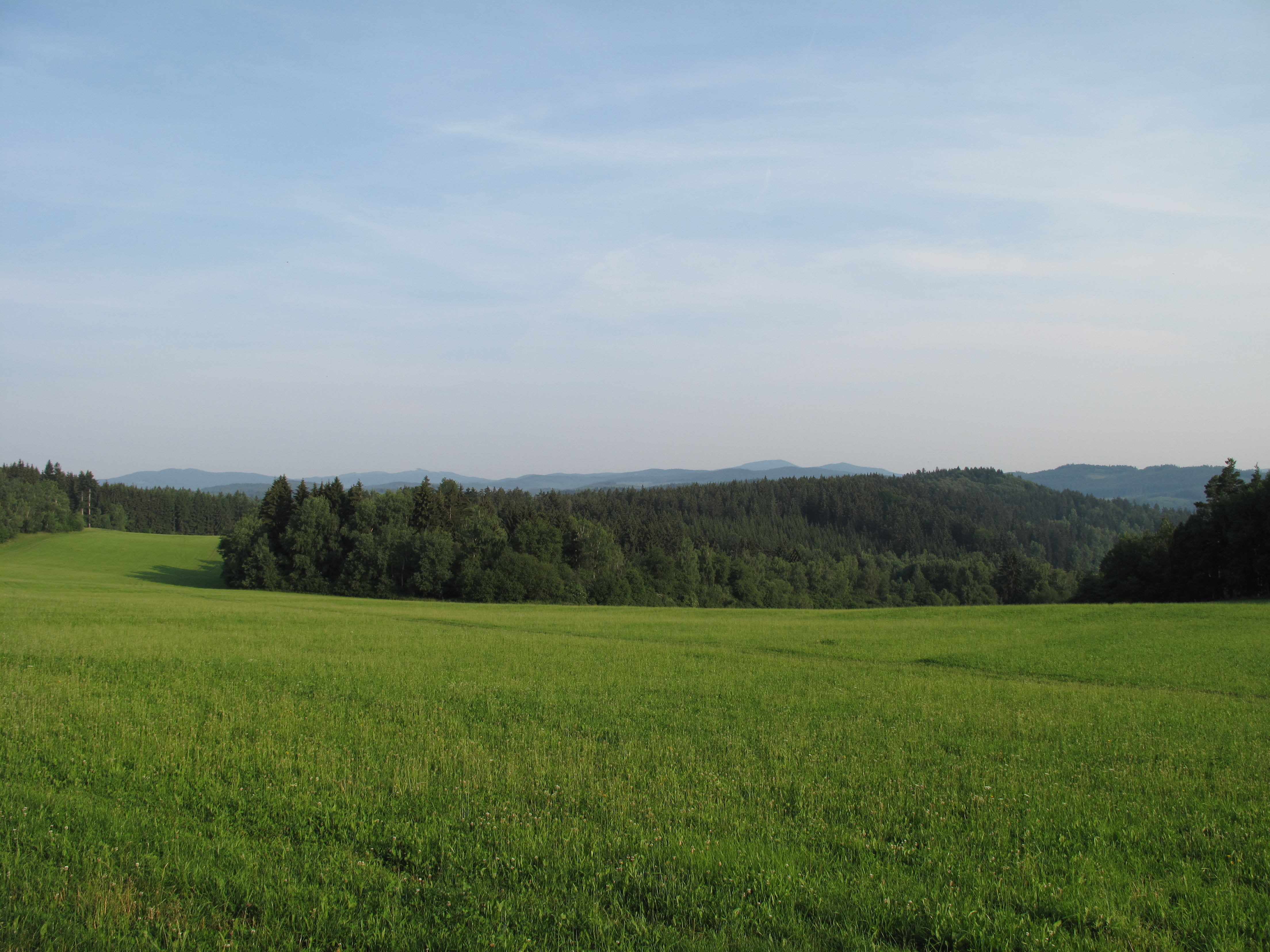 Louky pošumaví u Českého Krumlova. Okres Český Krumlov, Česká republika.